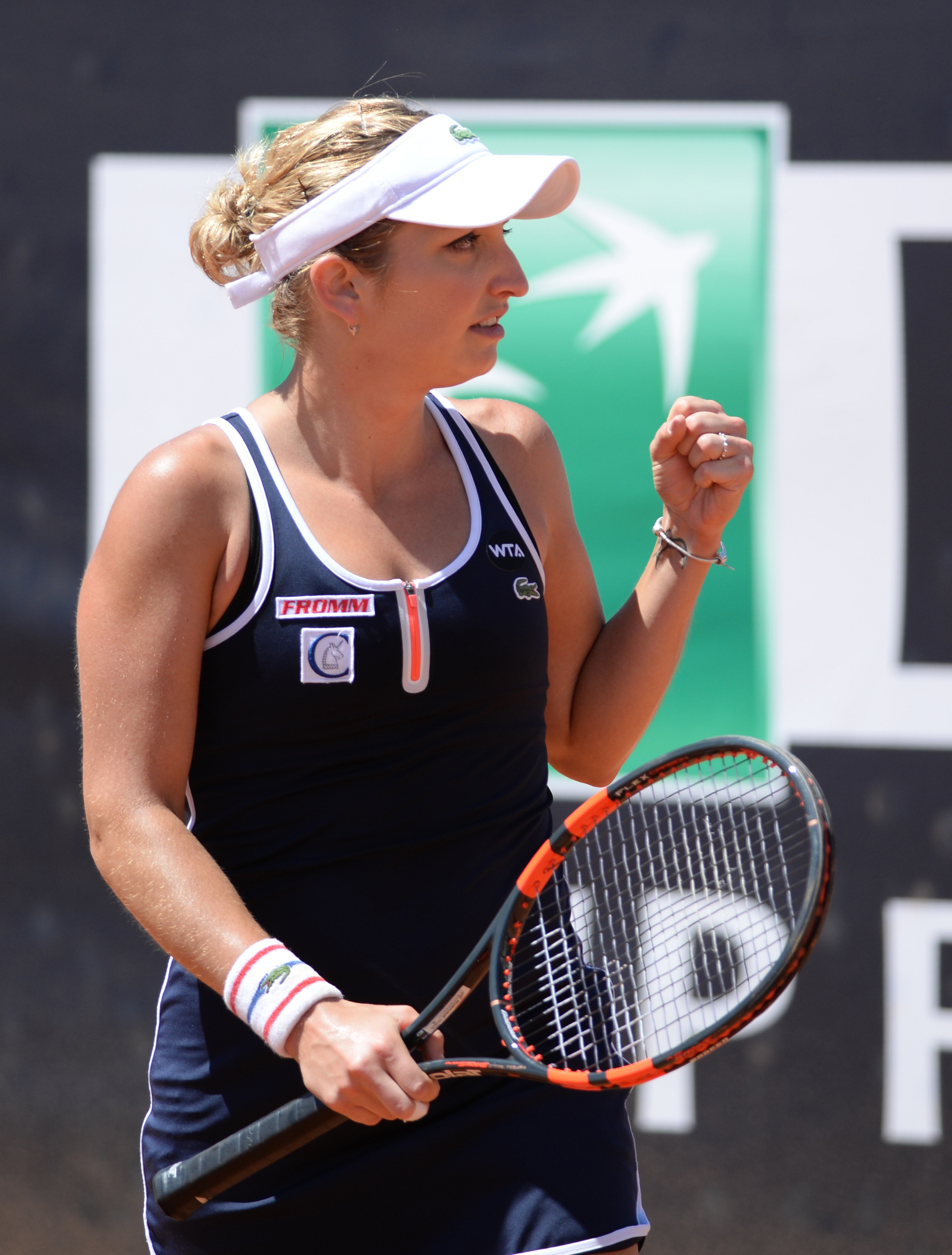 Timea Bacsinszky